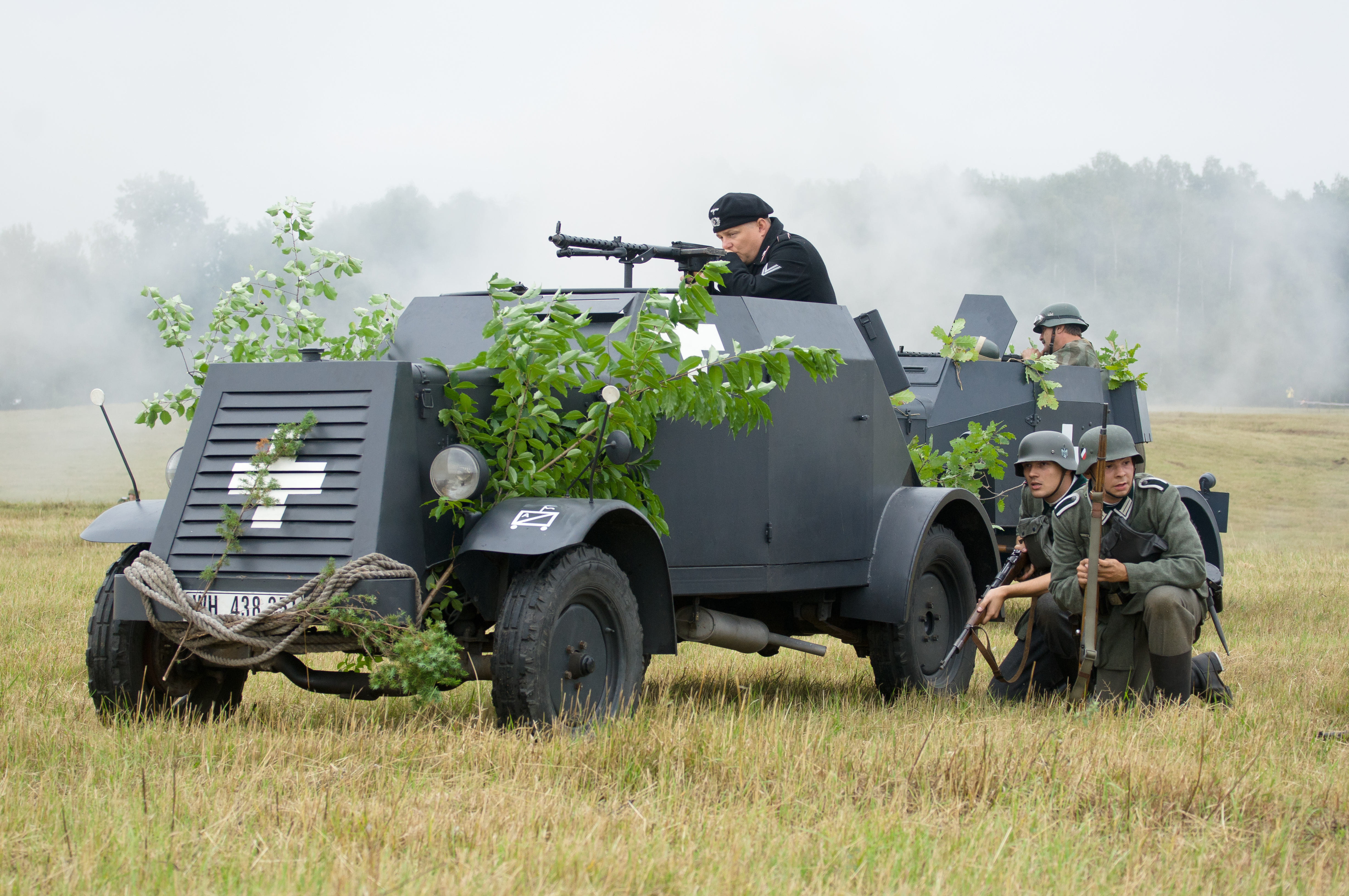 Replika charakteryzowana na Samochód pancerny Kfz.13 podczas V rekonstrukcji Bitwy pod Mławą, 1. września 2012.